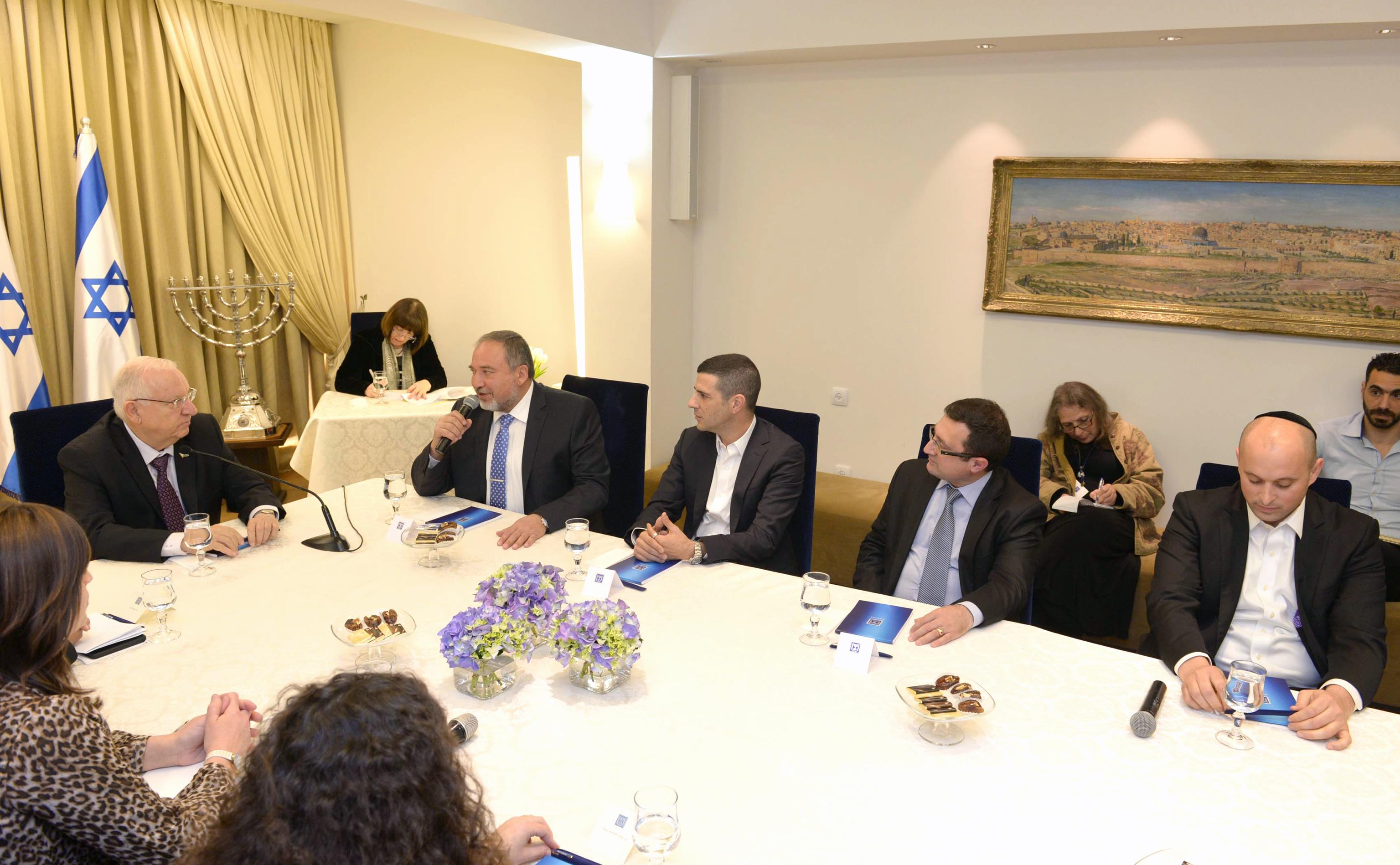 נשיא מדינת ישראל ראובן ריבלין פותח בהתייעצויות עם המפלגות השונות לקראת הרכבת הממשלה לאחר בחירות מרץ 2015 עם ישראל ביתנו